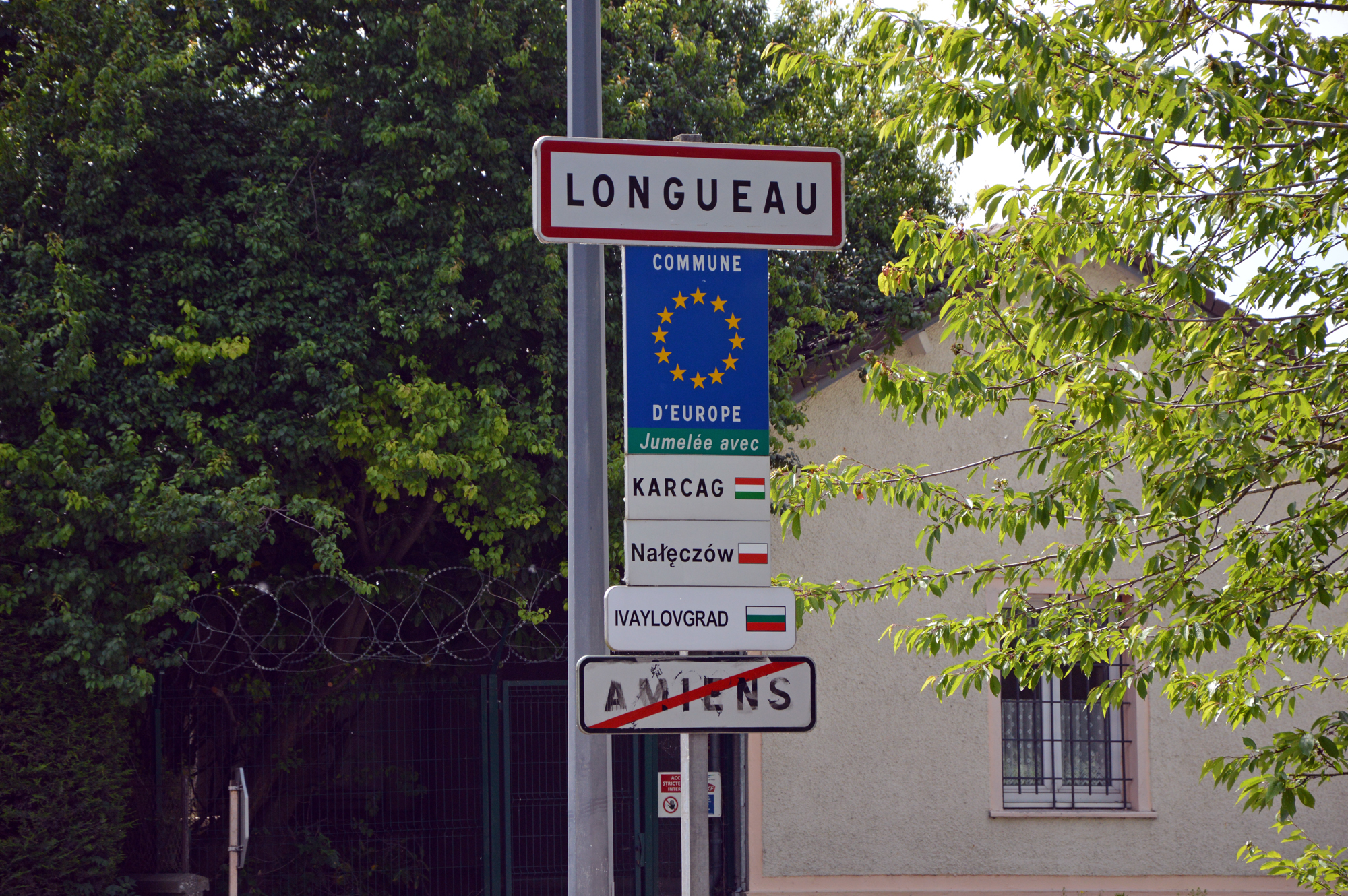 Panneau entrée de Longueau en venant d'Amiens avec les communes jumelées